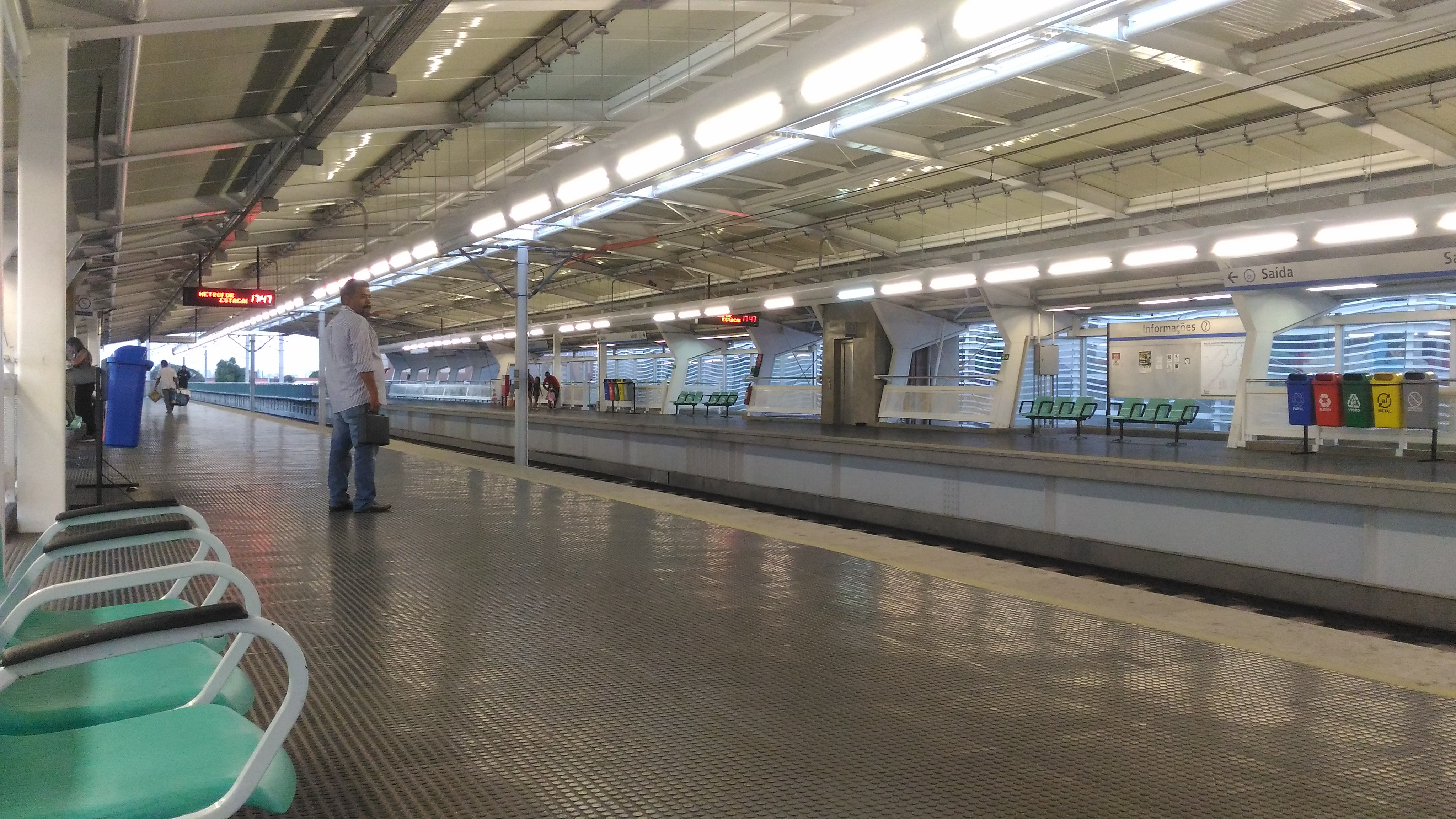 Plataformas da linha sul do metrô da estação Parangaba.